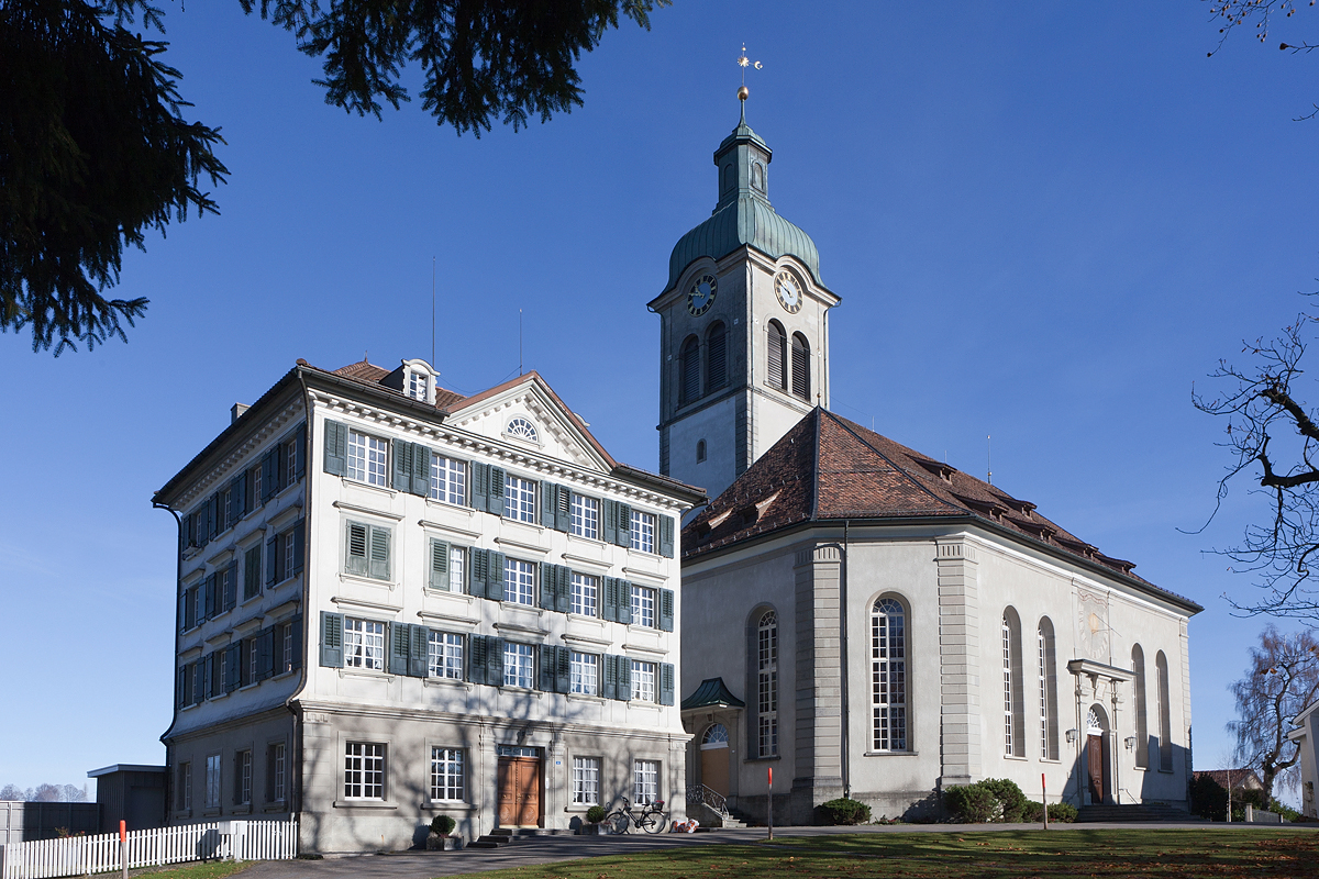 Pfarramt und Kirche von Speicher AR